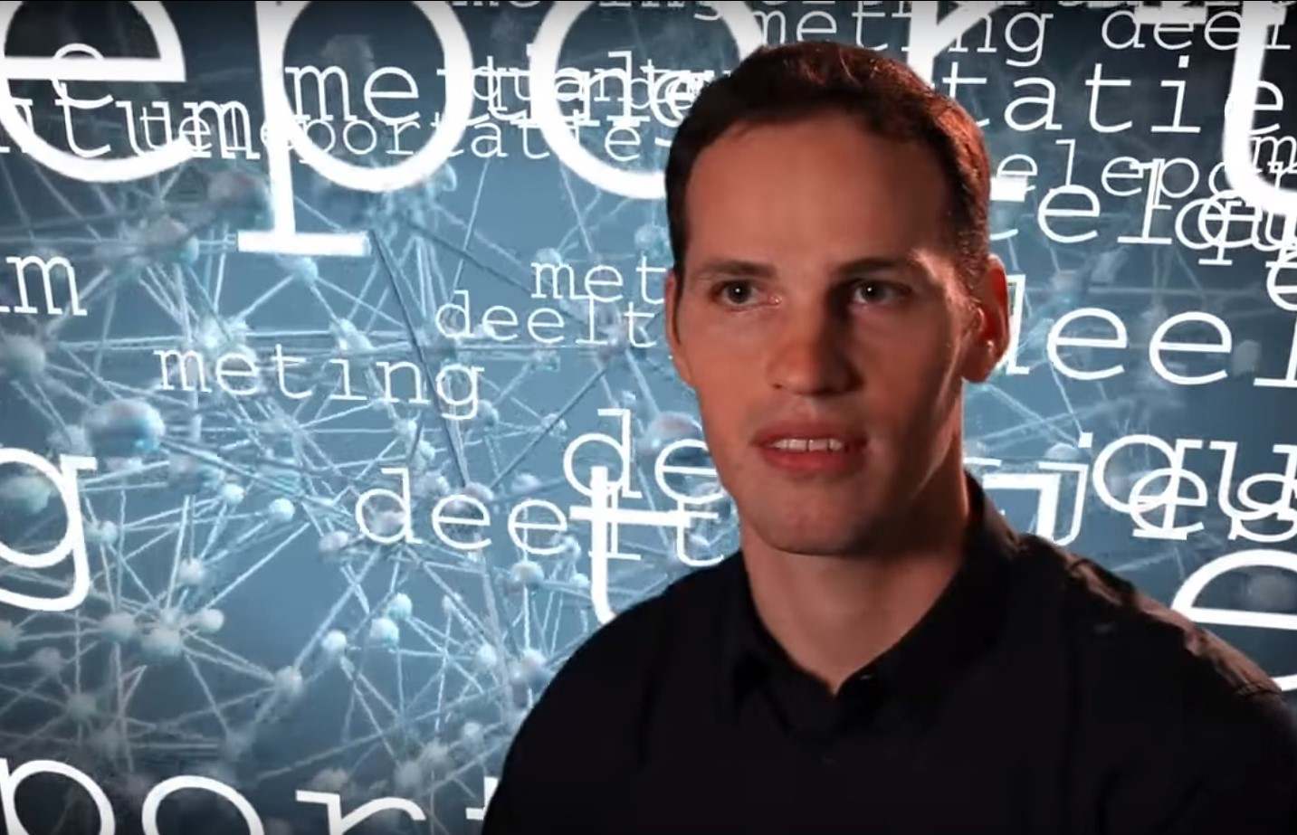 Quantumteleportatie van elektronentoestanden Teleportatie klinkt als science fiction: maar in de quantumwetenschappen is het al veel meer science dan fiction. Ronald Hanson werkt aan de teleportatie van de toestand van de ene elektron naar de andere. Teleportatie vormt een belangrijke schakel bij de ontwikkeling van de quantumcomputer. Geproduceerd door Fast Facts Mogelijk gemaakt door De Jonge Akademie en Ronald Hanson Met dank aan Iris Koopmans, Bureau de Jonge Akademie, Machiel Blok, Gijs de Lange, Hannes Bernien, Lucio Robledo, Marja Plas, Technische Universiteit Delft Gemaakt door: Jasmijn Snoijink 2011 In samenwerking met Camera: Michiel Meester en Jonathan Massey Montage & compositing: Jonathan Massey Muziek: Daan van West Grafisch ontwerp: SproetS Animatie: Wolfgang Pfaff, Hannes Bernien